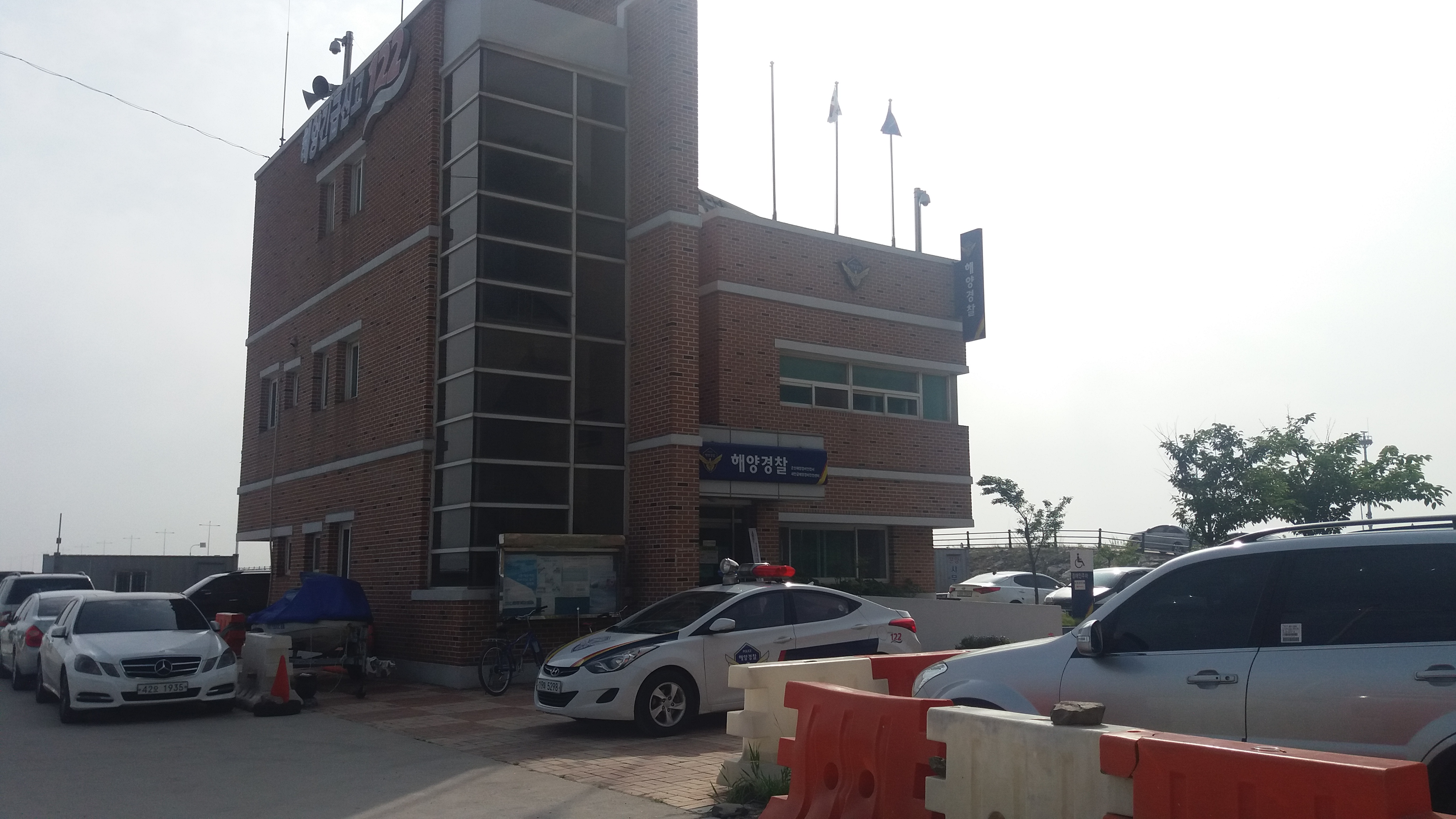 군산해양경비안전서 새만금해양경비안전센터